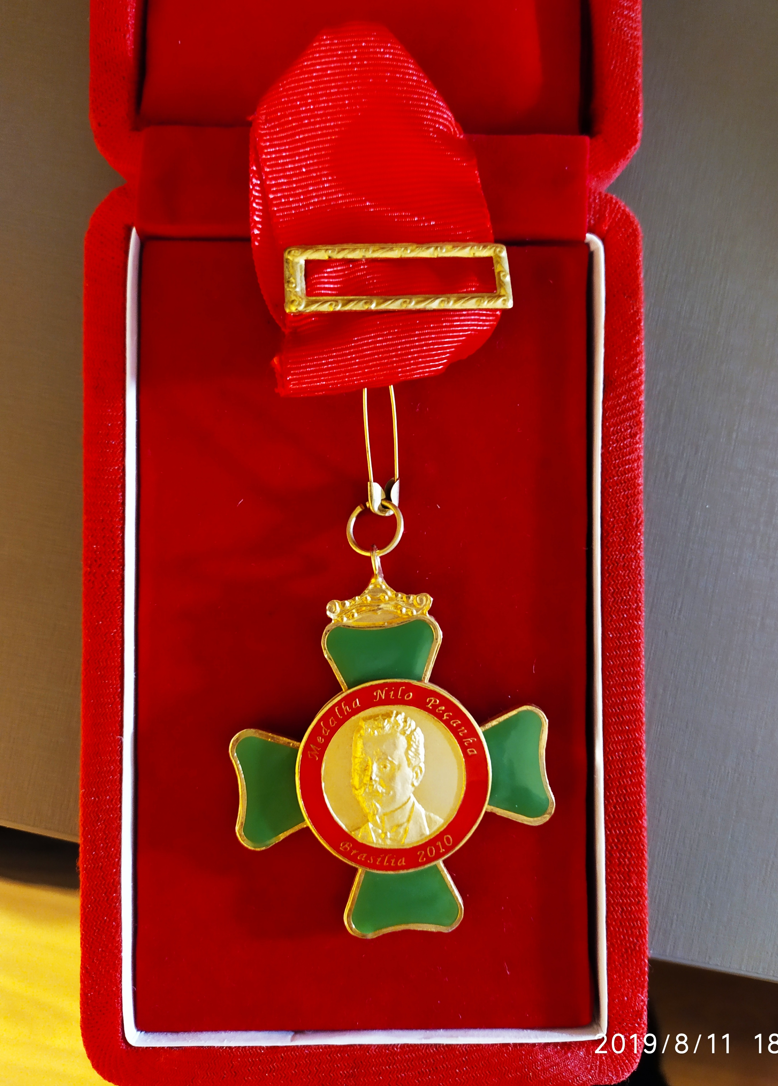 Medalha Nilo Peçanha, concedida ao prof. Colombo.